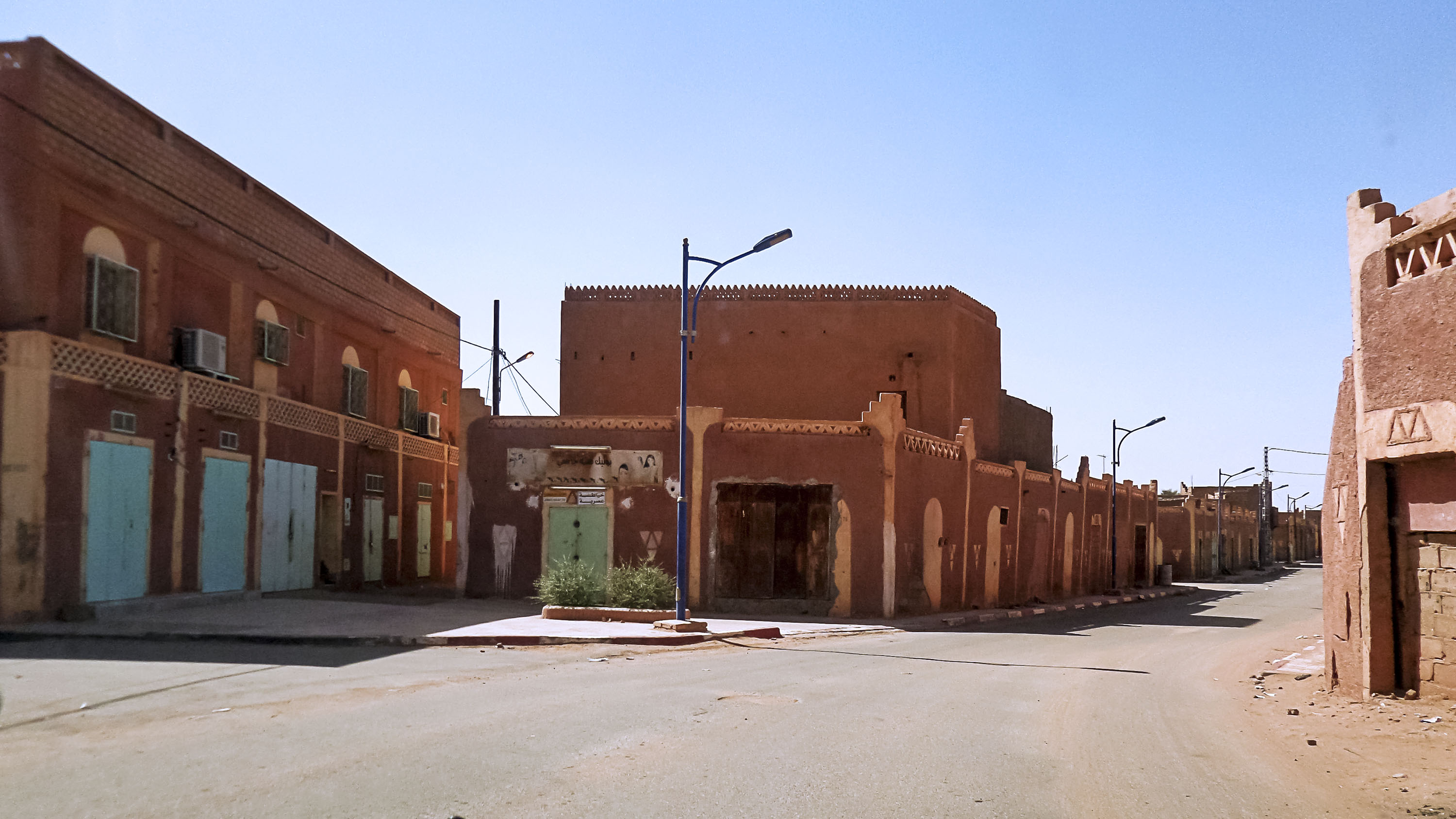 Ville de In Salah à Tamanrasset - Algérie مدينة عين صالح بولاية تمنراست - الجزائر